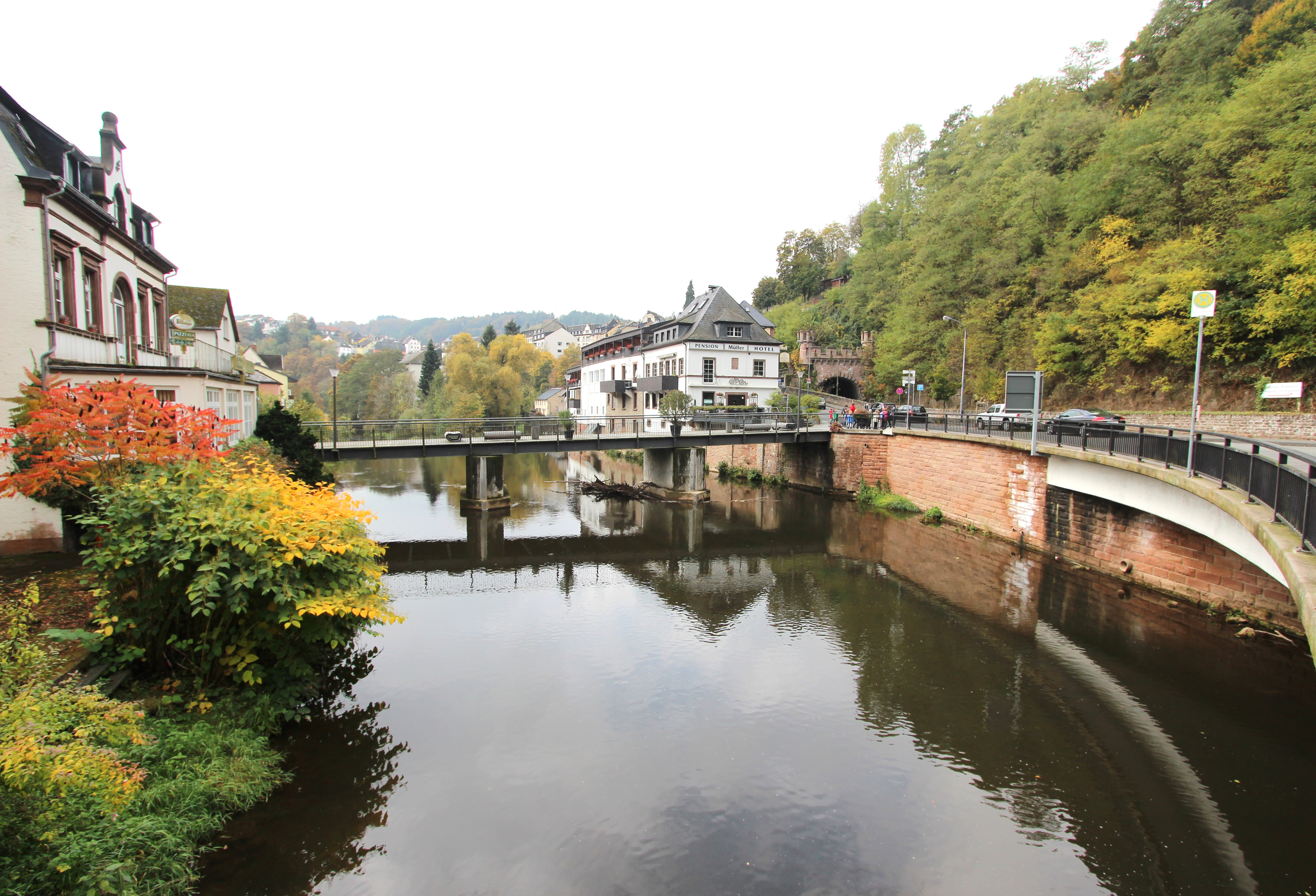 54655 Kyllburg/Eifel; Der umschließende Wassergürtel der Kyll in Kyllburg. Die Kyll gehört zu den größten innerdeutschen Flüssen von Rheinland-Pfalz, da die deutlich größeren Flüsse Mosel, Saar und Sauer grenzüberschreitend sind. Aufnahme von 2016.